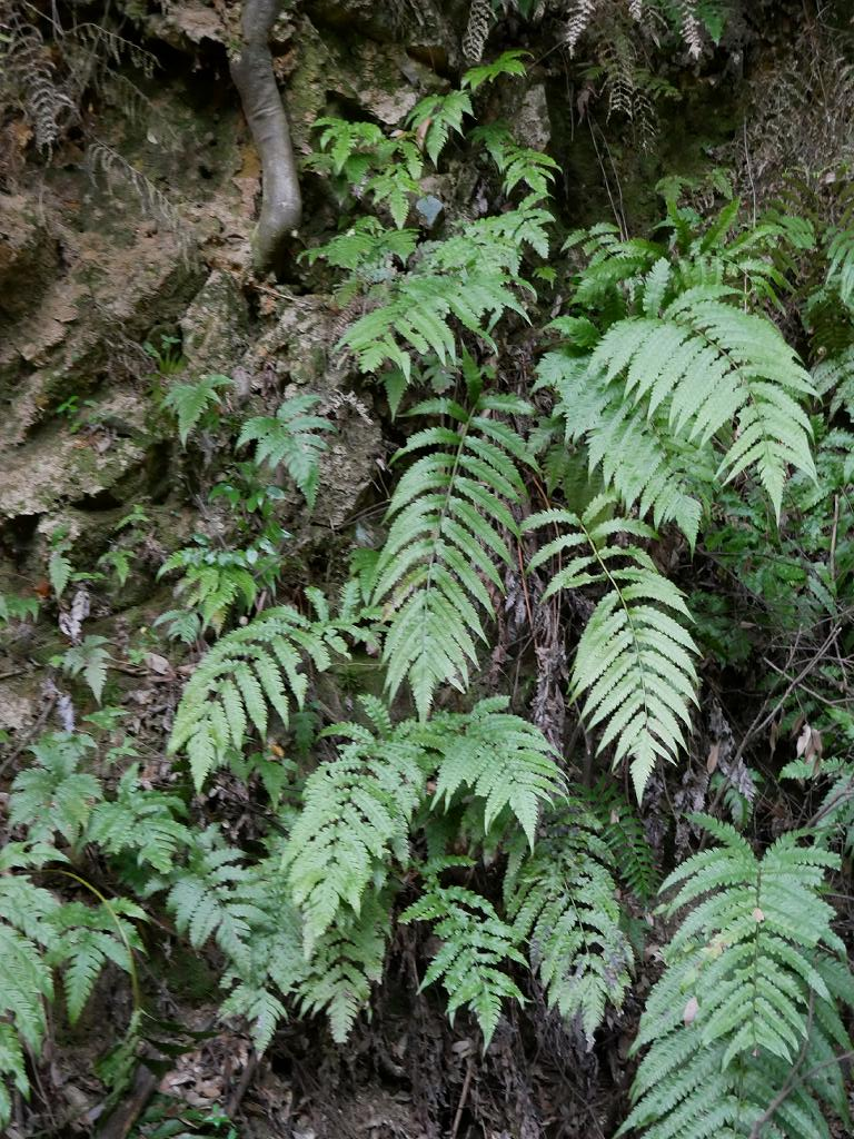 2019/04/23 山口県周南市：Syunan city, Yamaguchi Pref. japan